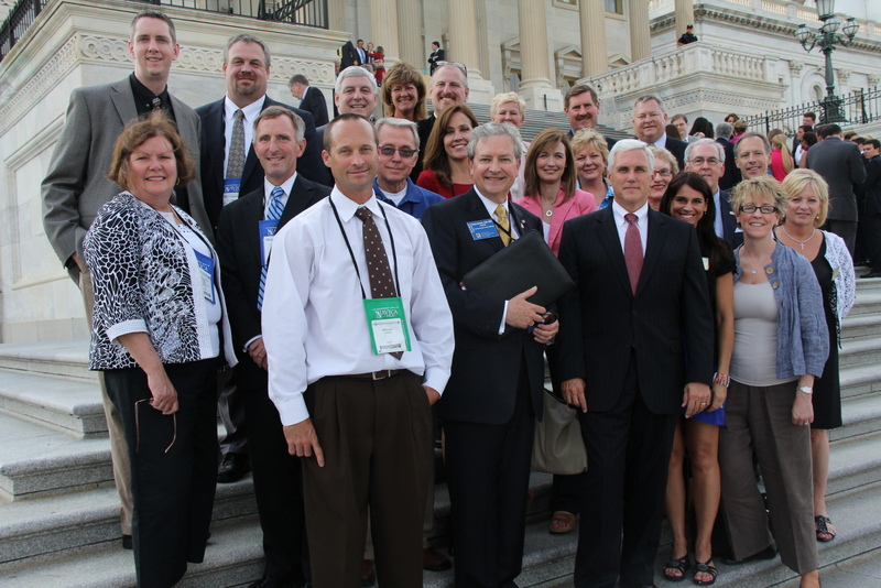 FPC Name: Randy Scheidt FPC State: IN